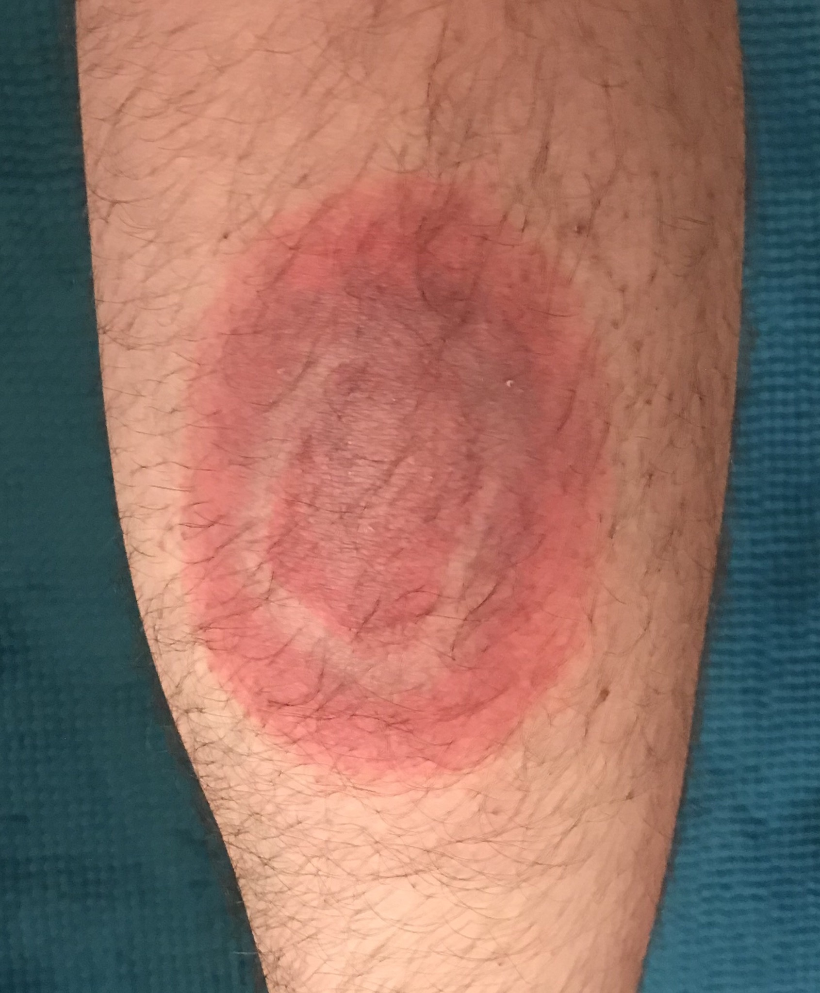 Erythema migrans (Wanderröte) auf einem männlichen Unterschenkel. Der Zeckenbiss ist in der Mitte. Das typische Zielscheibenförmige Muster kommt hier gut zur Geltung. Der Durchmesser beträgt in der Höhe 14 cm, in der Breite 10 cm.